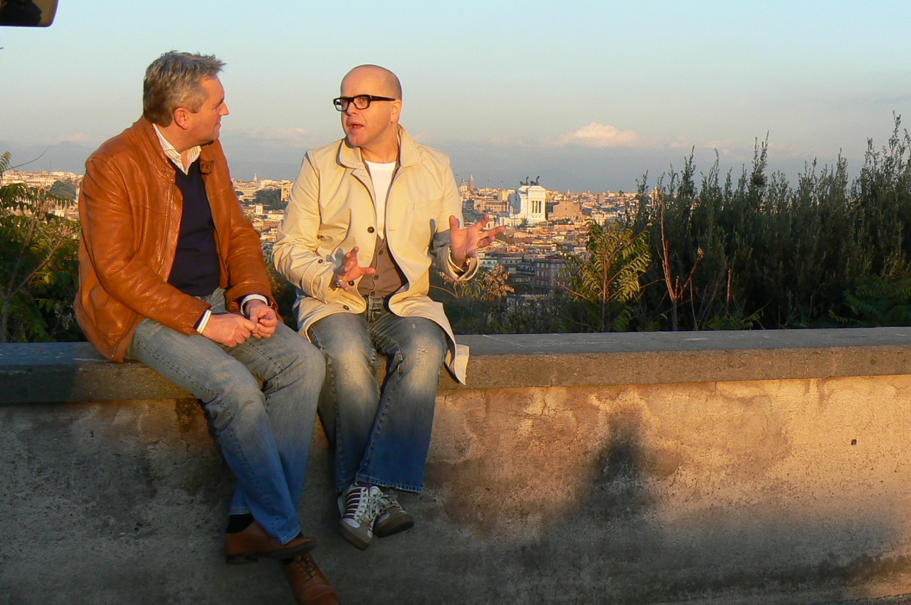 RKK-presentator Wilfred Kemp in Rome voor opnames van RKK Kruispunt TV